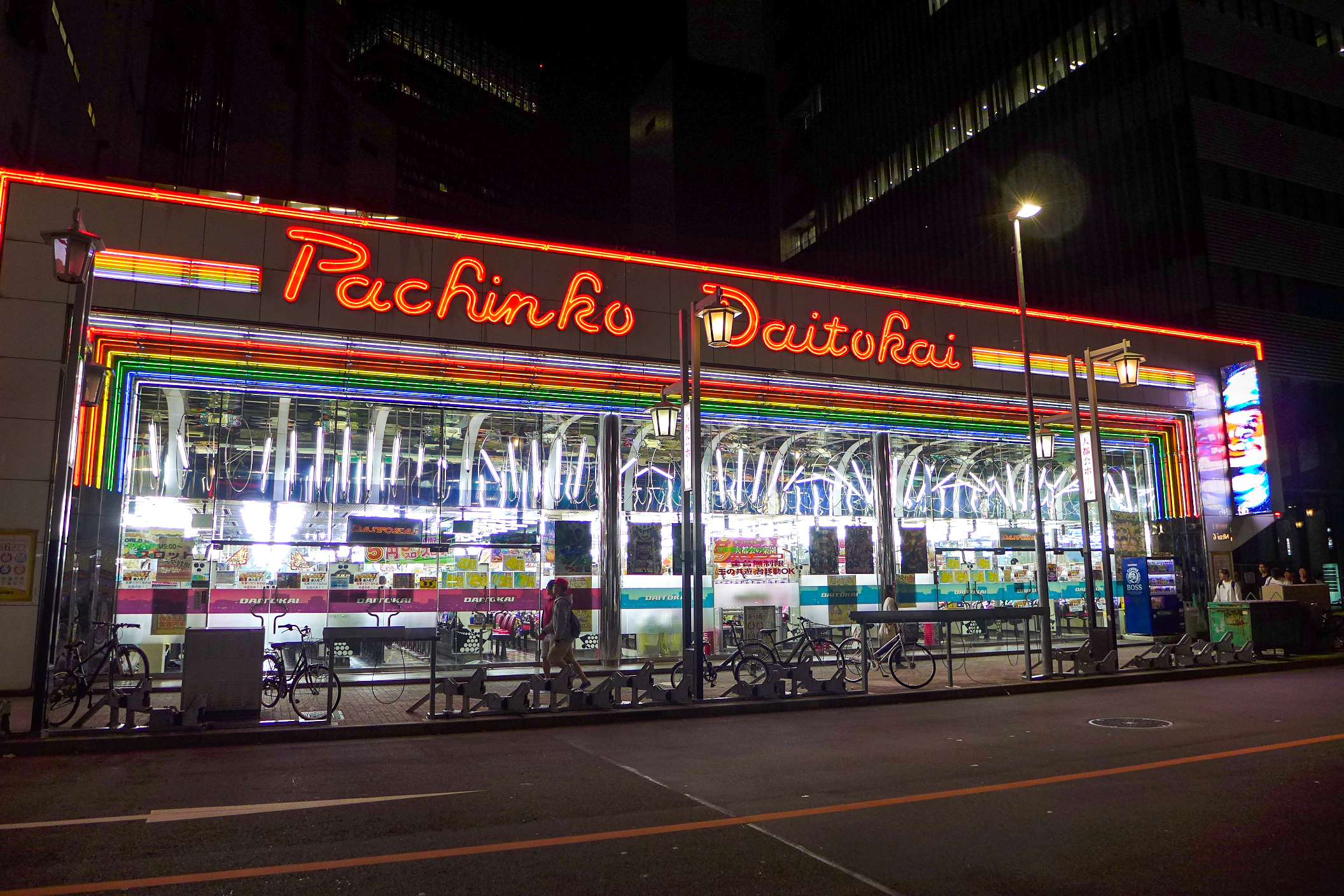 Pachinko Datiokai in Nagoya